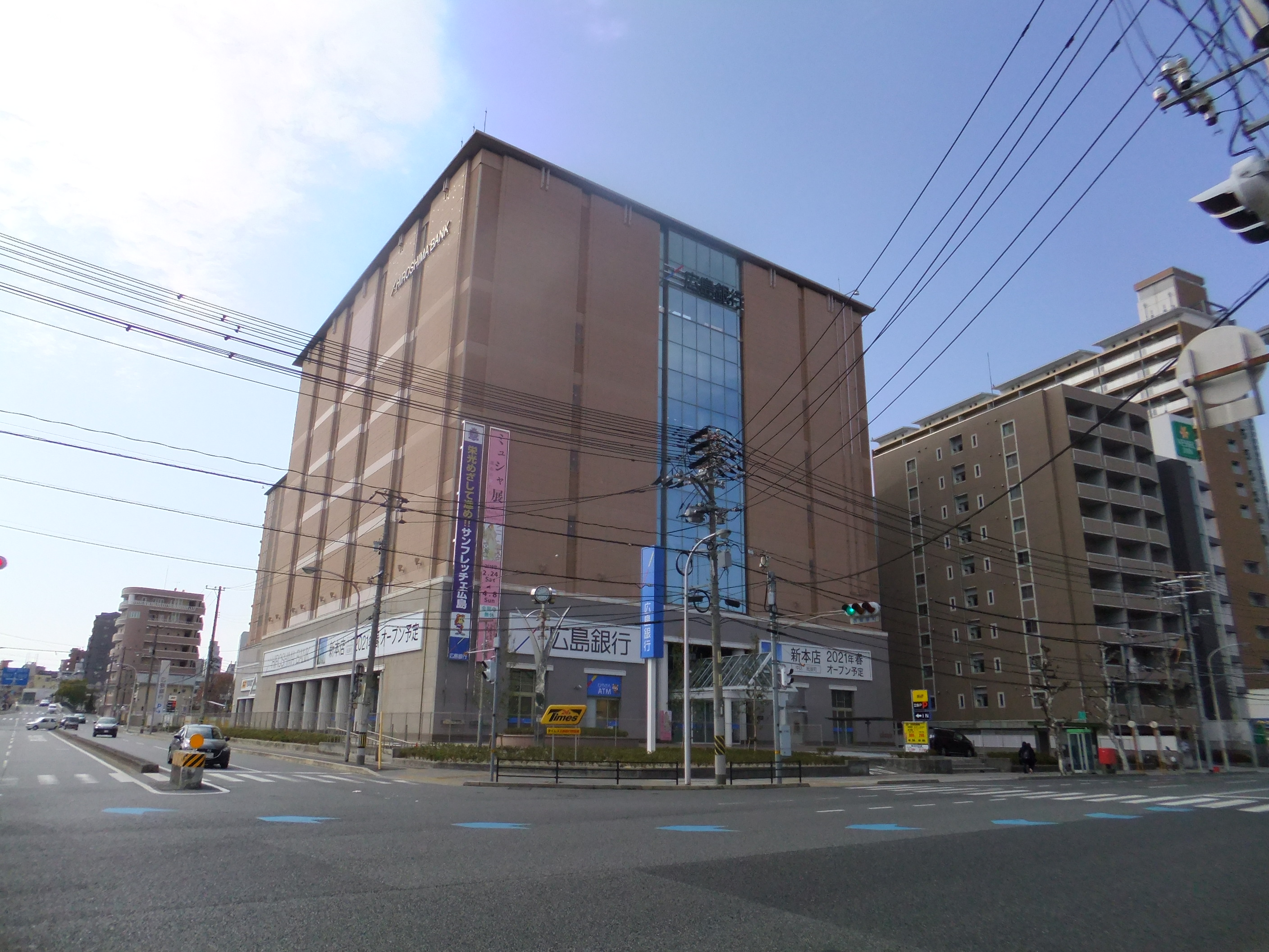 広島銀行仮本店